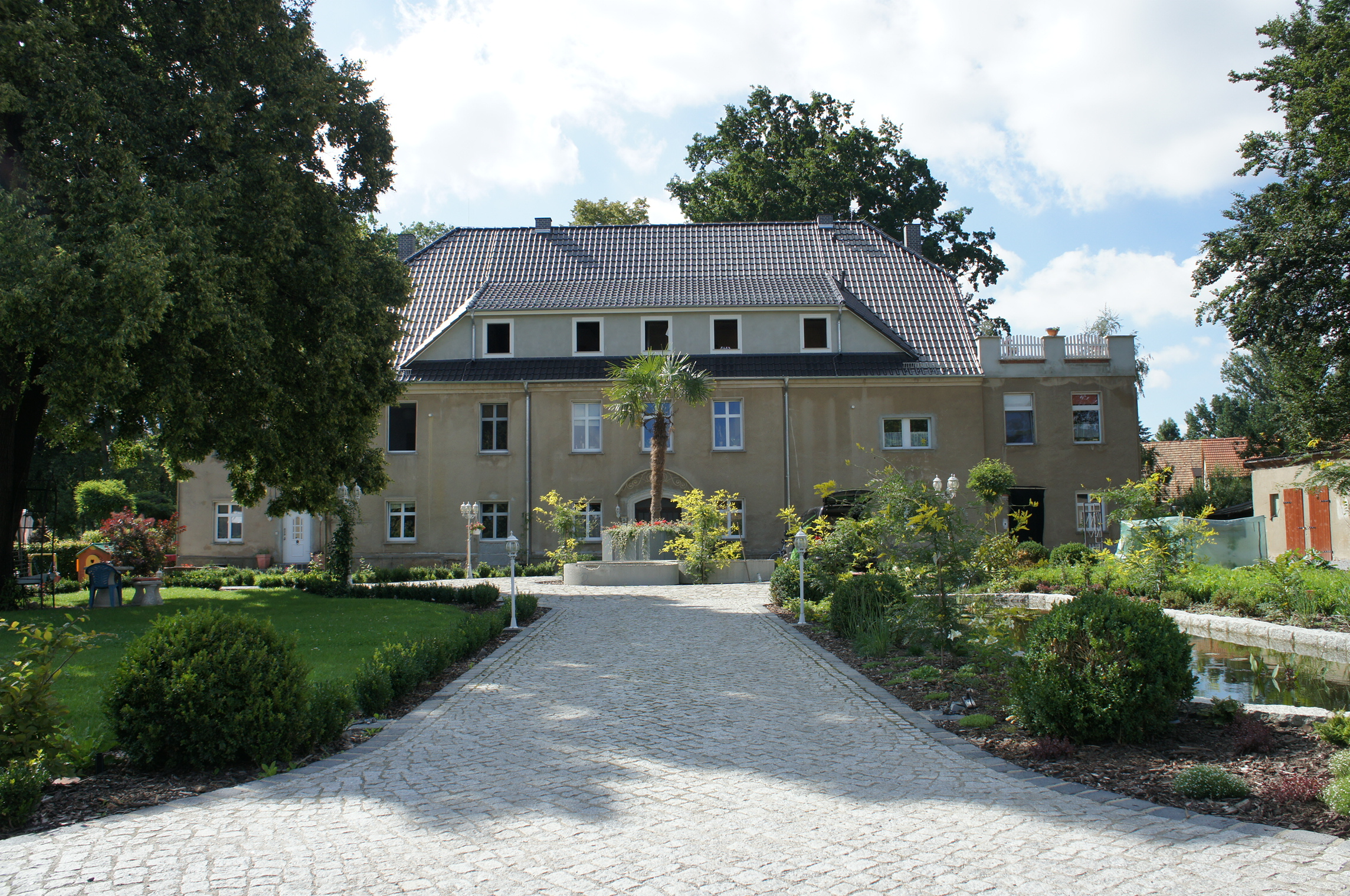 Rittergut in Luga. Rittersitz aus dem 16. Jahrhundert. Mittelbau aus der Zeit um 1750, Seitenflügel 19. Jh. Besitzer u.a. die Familien: Elisabeth von Haugwitz, von Gersdorf, von Luttitz, von Ponickau, von Schönberg, von Schönberg-Bibra, von Zedlitz und Neukirch, Dr. Lauterbach. Heute Privatbesitz